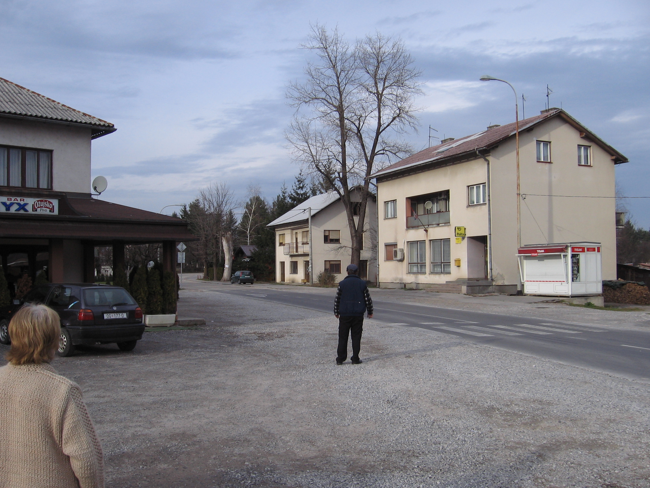 Josipdol, Munjava